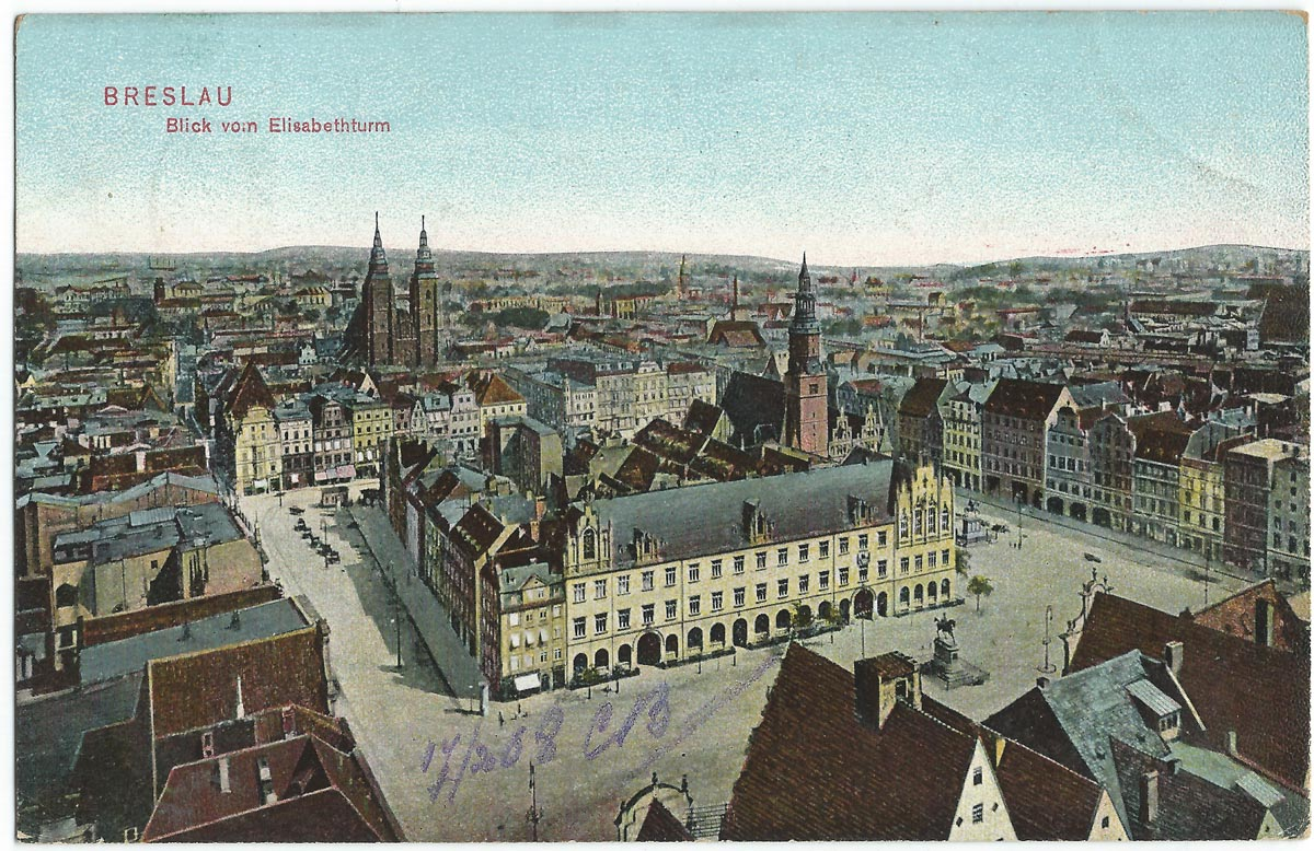 Blick vom Elisabethturm auf den Großen Ring, Breslau, Niederschlesien, Polen.